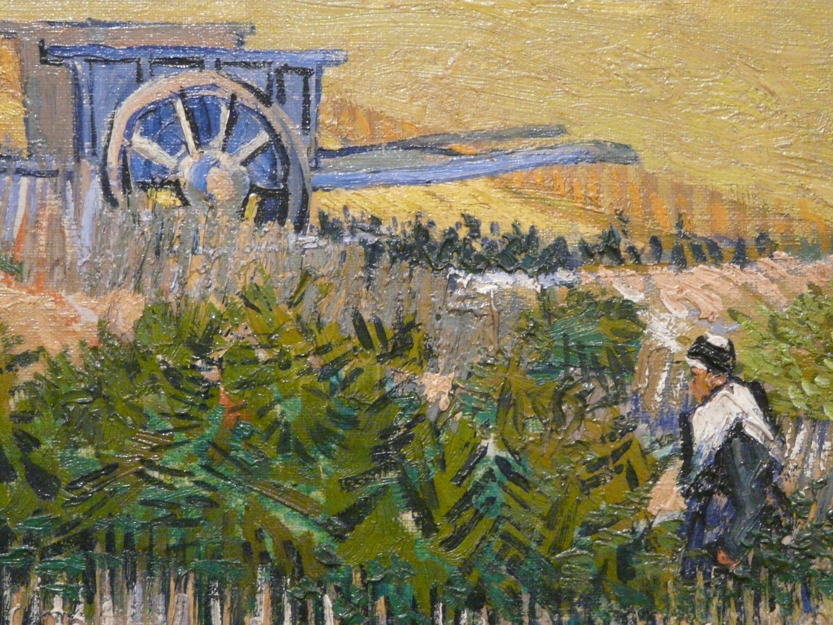 Vincent van Gogh (1853-1890) The harvest (detail) (1888) Foto gemaakt tijdens wiki loves art nl exclusieve fotosessie in het van Gogh Museum in Amsterdam op 23 juni 2009. Photo taken during Wiki Loves Art Netherlands exclusive photo session in the Van Gogh Museum in Amsterdam on 23 June 2009.